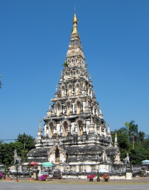 Wat Ku kham at Saraphi District, Chiang Mai